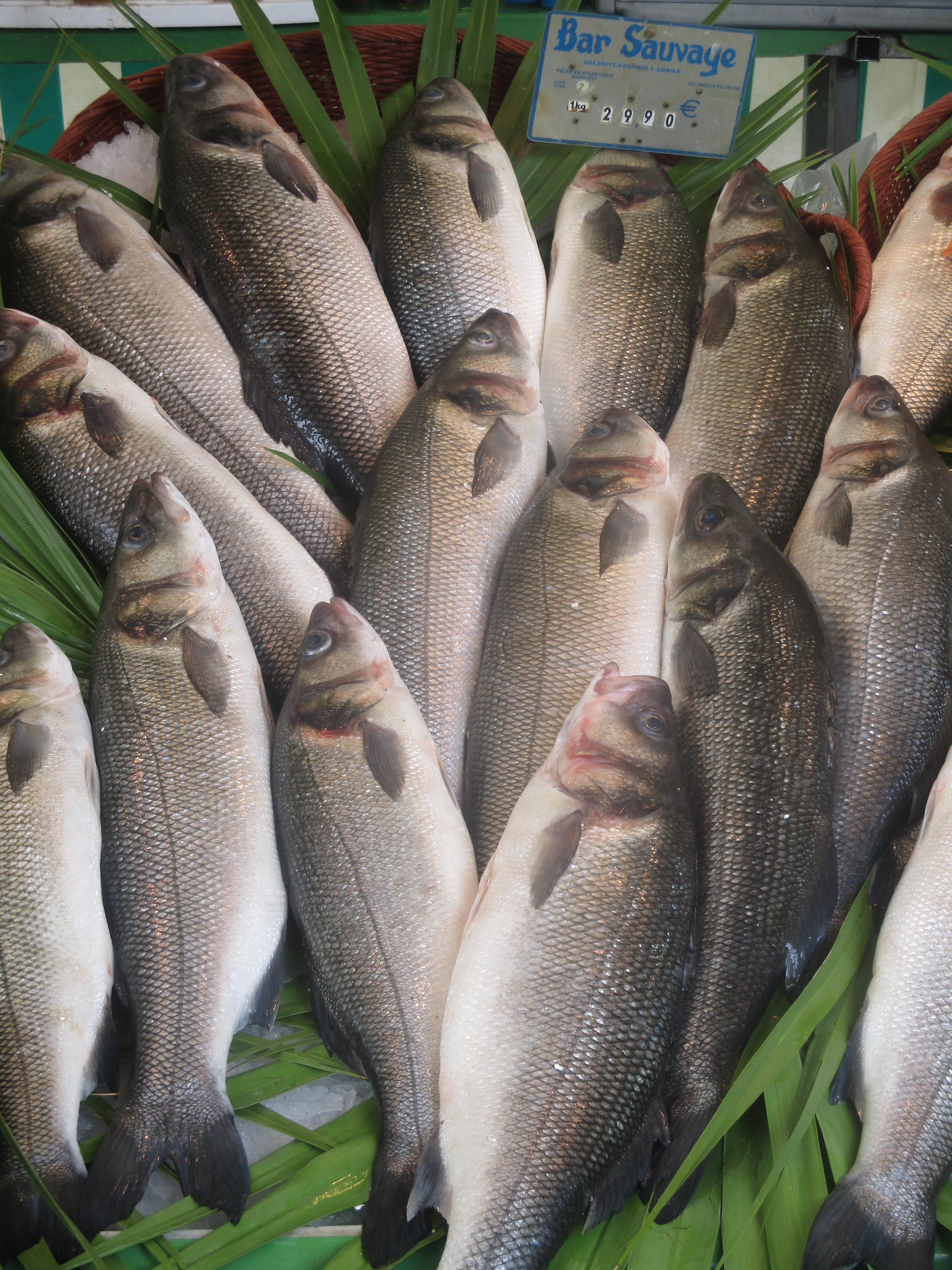 Bars sauvages dans un étalage de poissonnier au marché de Neuilly.